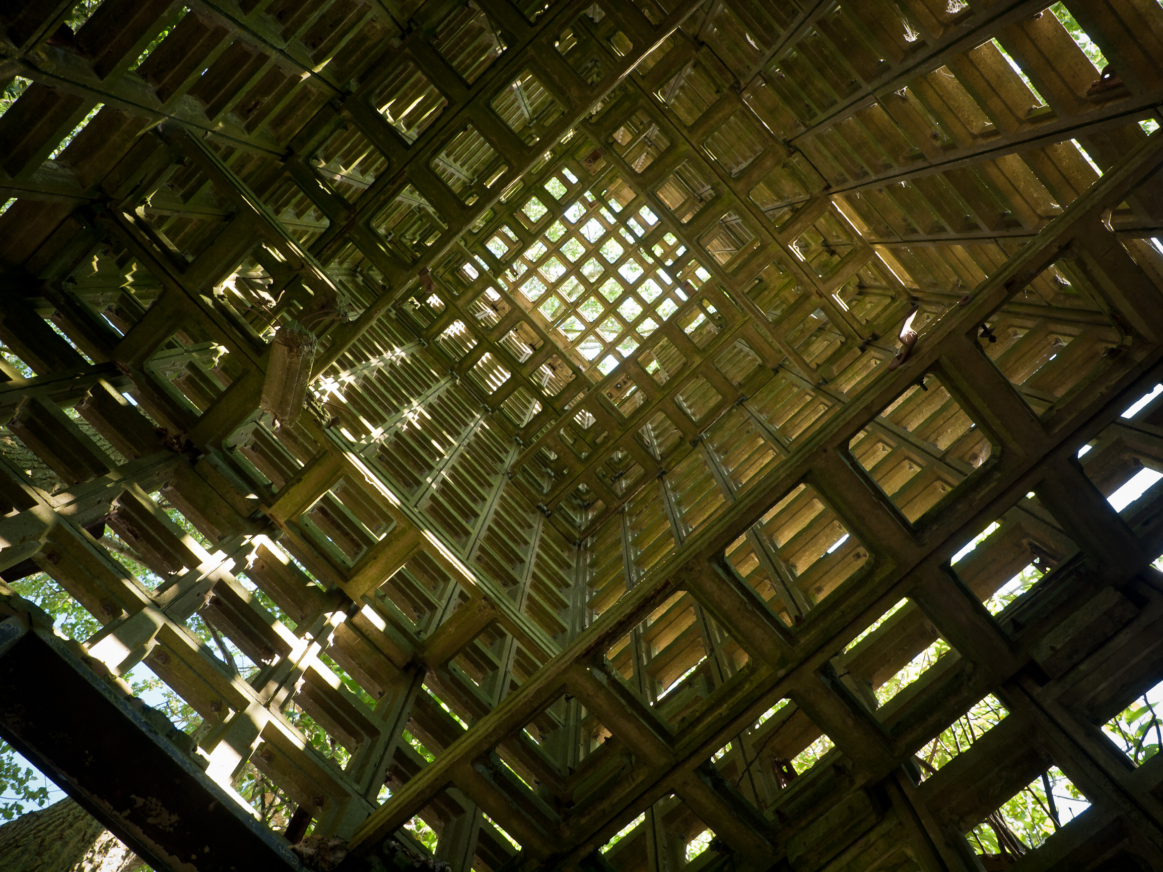 Luchtwacht raatbouw toren nabij Warfhuizen